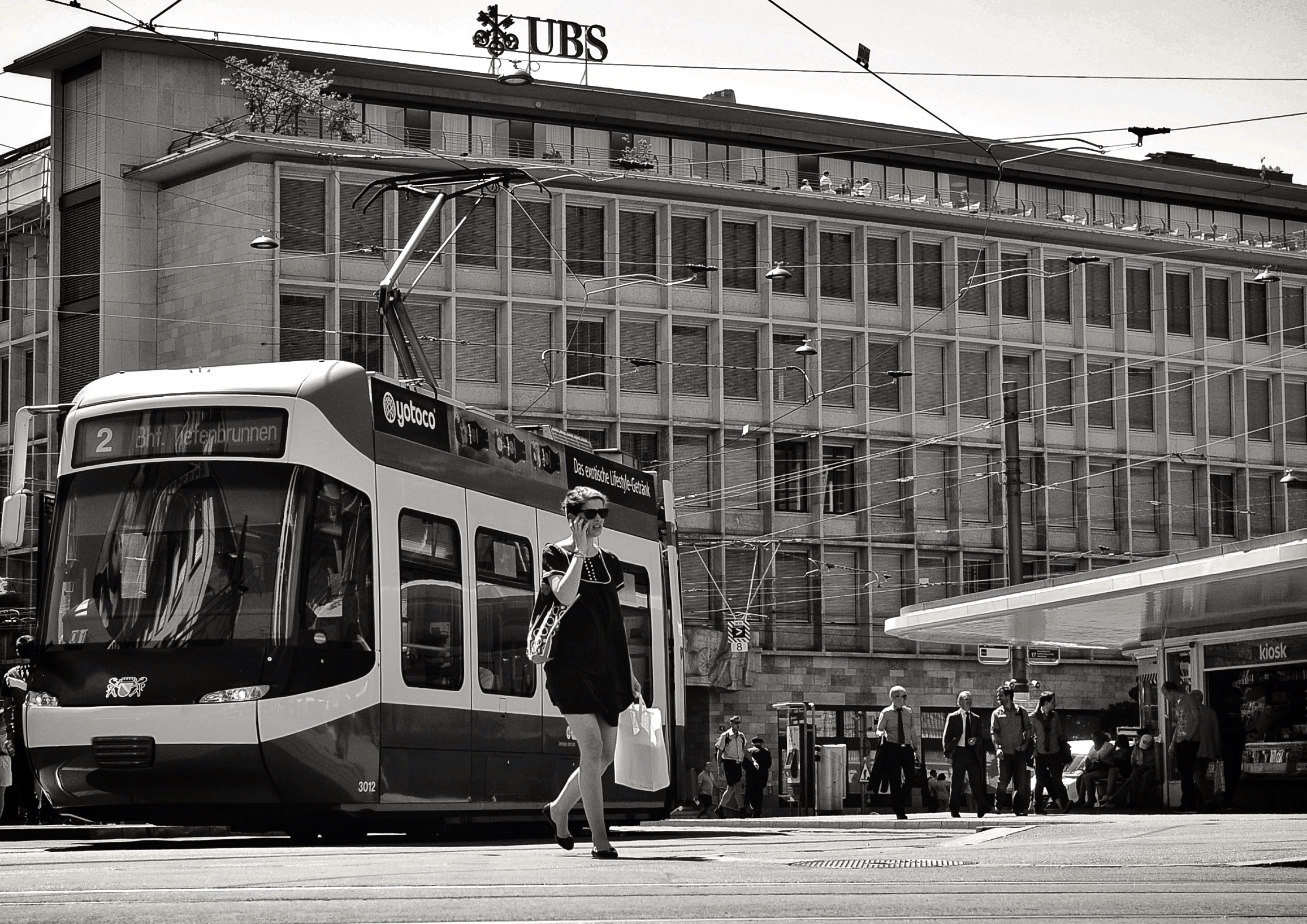 Zurich Switzerland Paradeplatz